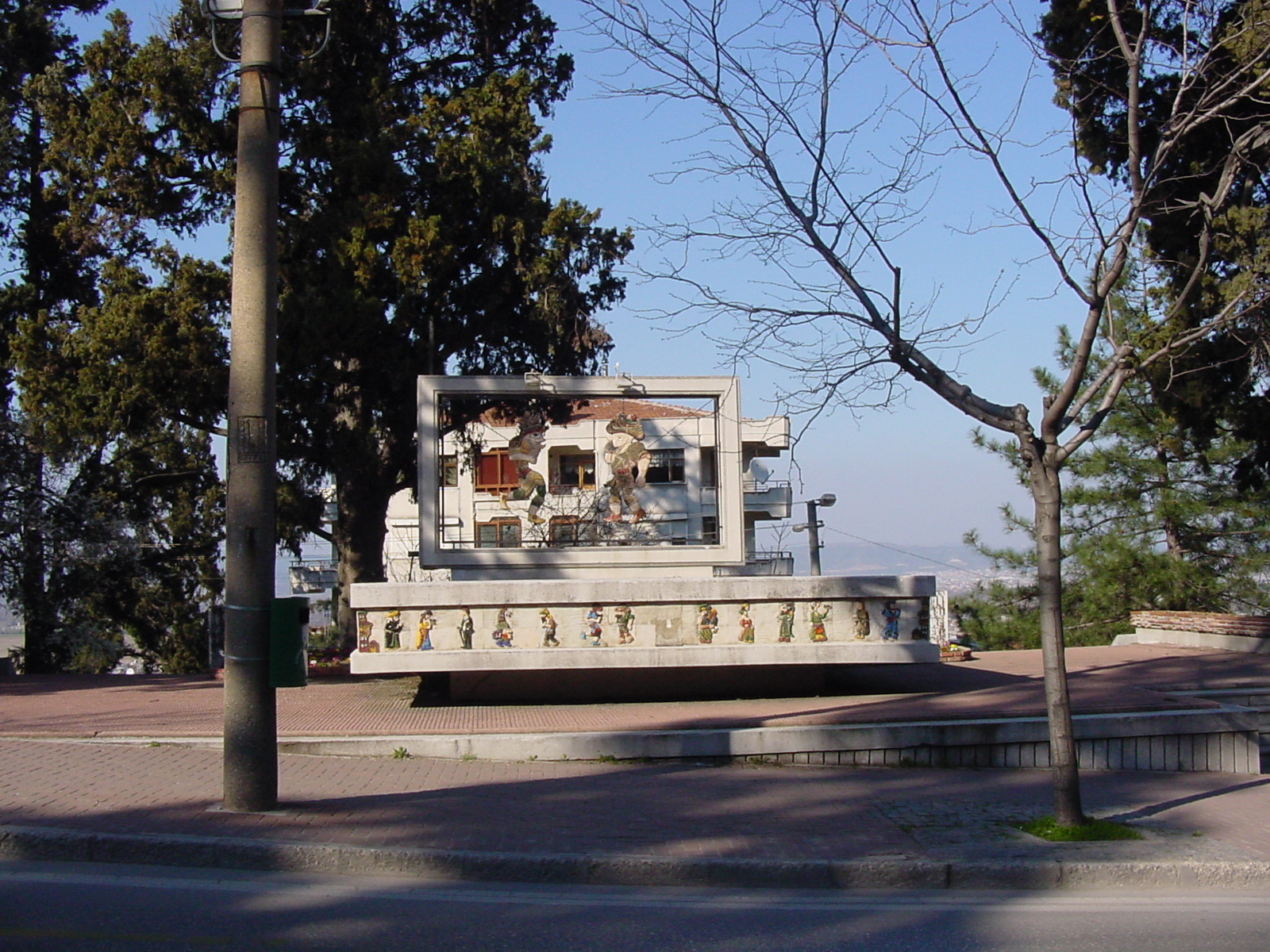 BURSA-KARAGÖZ-HACIVAT